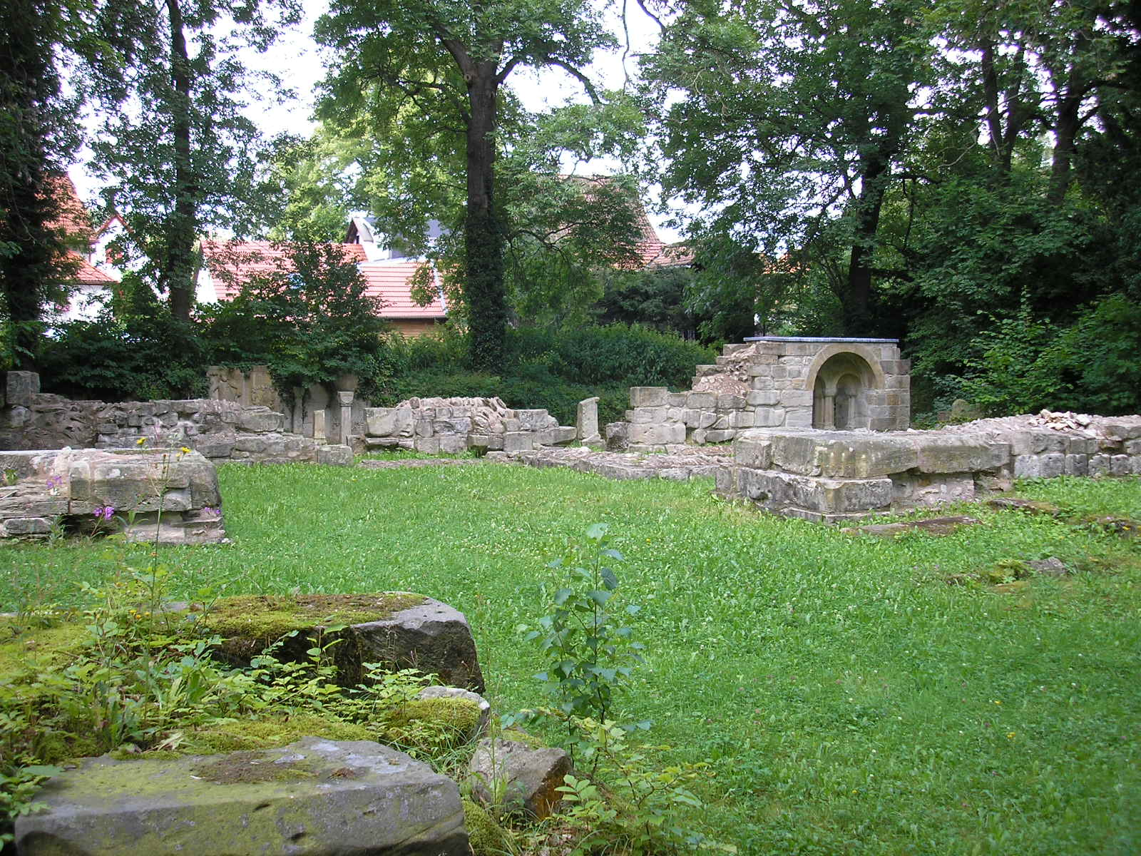 Teile der Ruinen des Klosters Georgenthal (Thüringen).